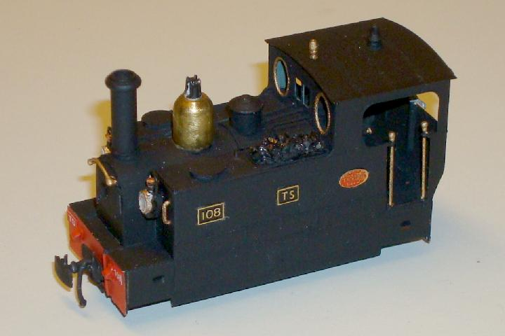 Montierter Bausatz einer Gecomodel Spur H0m Dampflokomotive (Gecomodel Locomotive 030 Blanc Misseron Ref. 171).